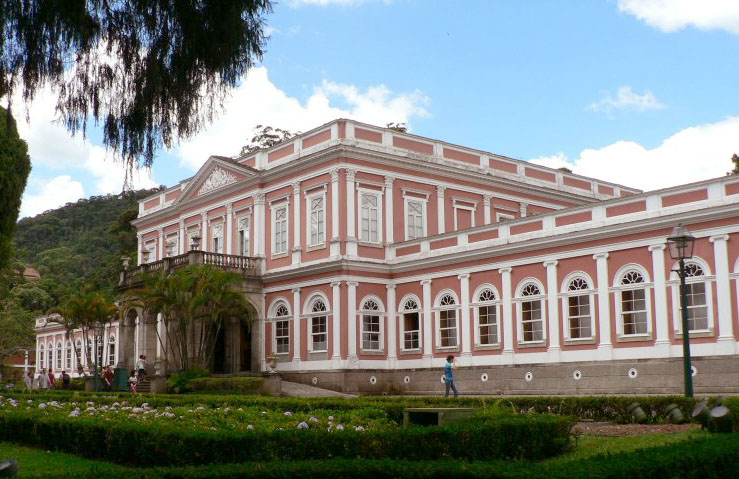 Museu Imperial in Petropolis, Brazil